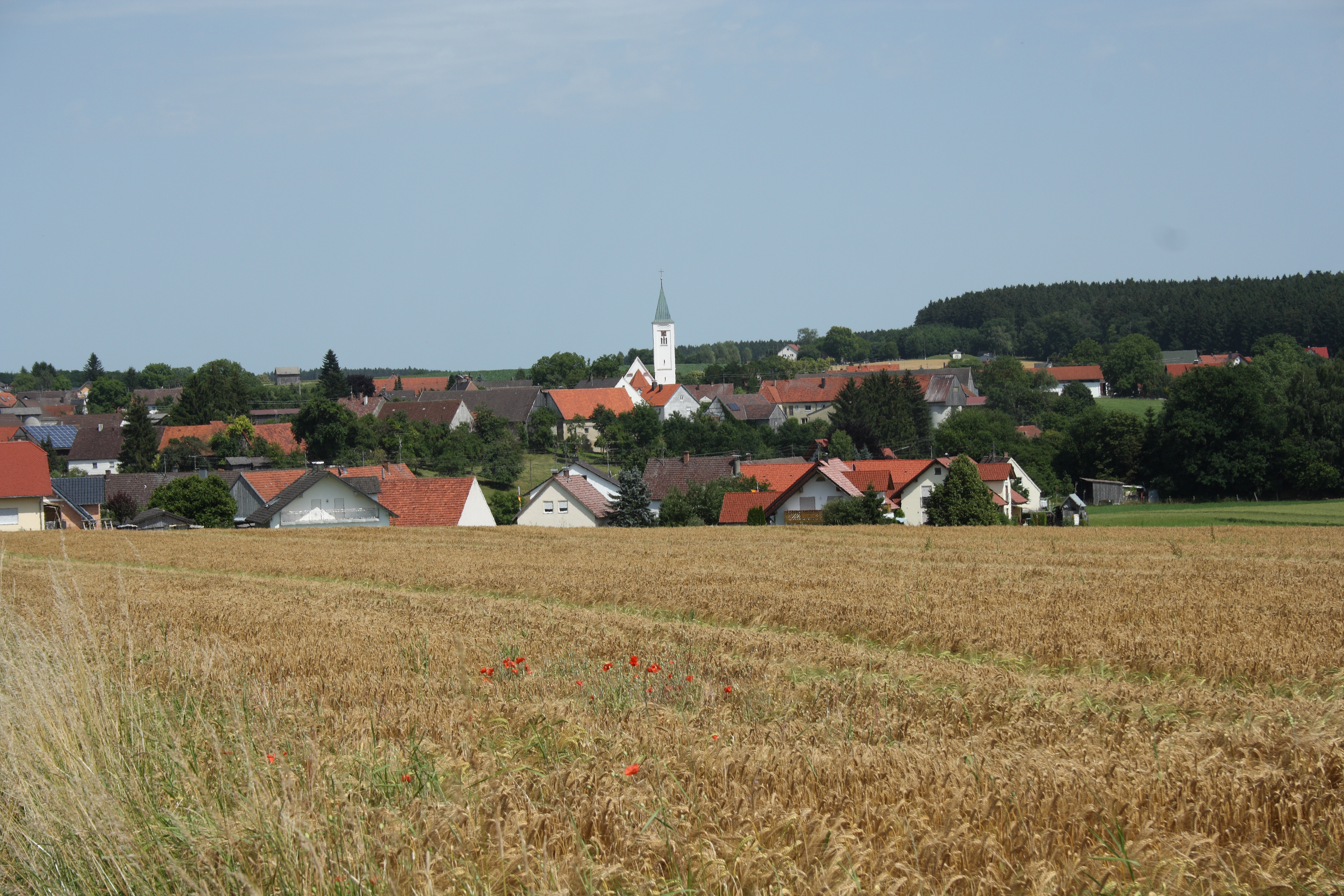 Katholische Pfarrkirche Maria Immaculata in Oberwaldbach, einem Ortsteil von Burtenbach im Landkreis Günzburg (Bayern), Chor und Turm 15./16. Jahrhundert, Langhaus 17./18. Jahrhundert